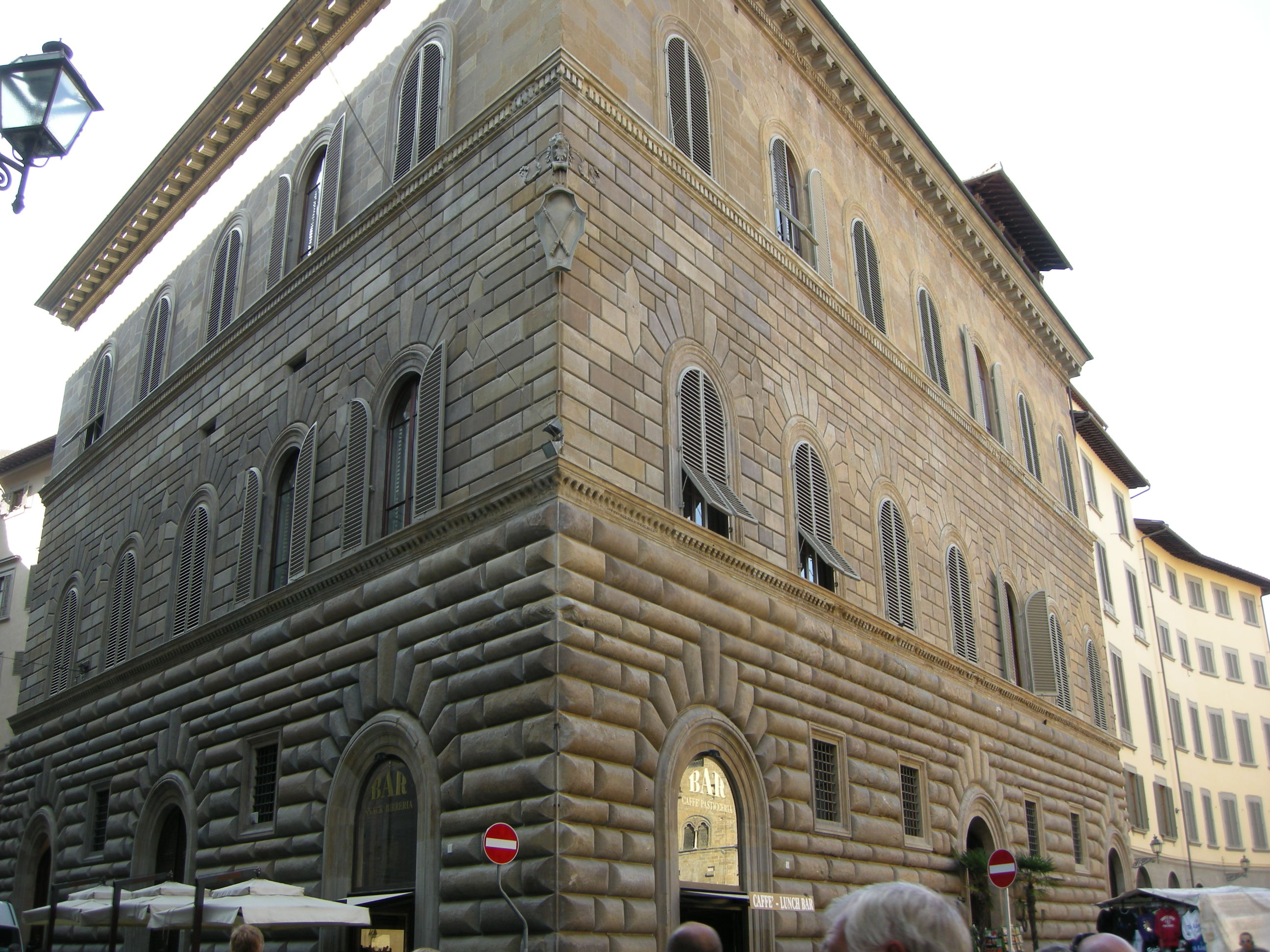 Palazzo gondi